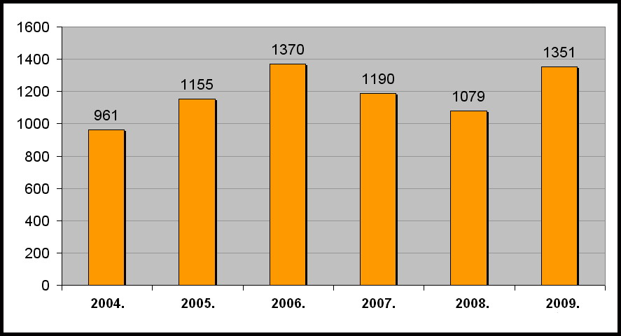 Произведено_тона_меда_у_Републици_Српској_(2004-2009)